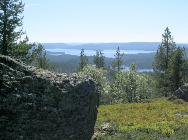 Rahajärvi Aviaispää-tunturilta katsottuna. Inarin kunta.